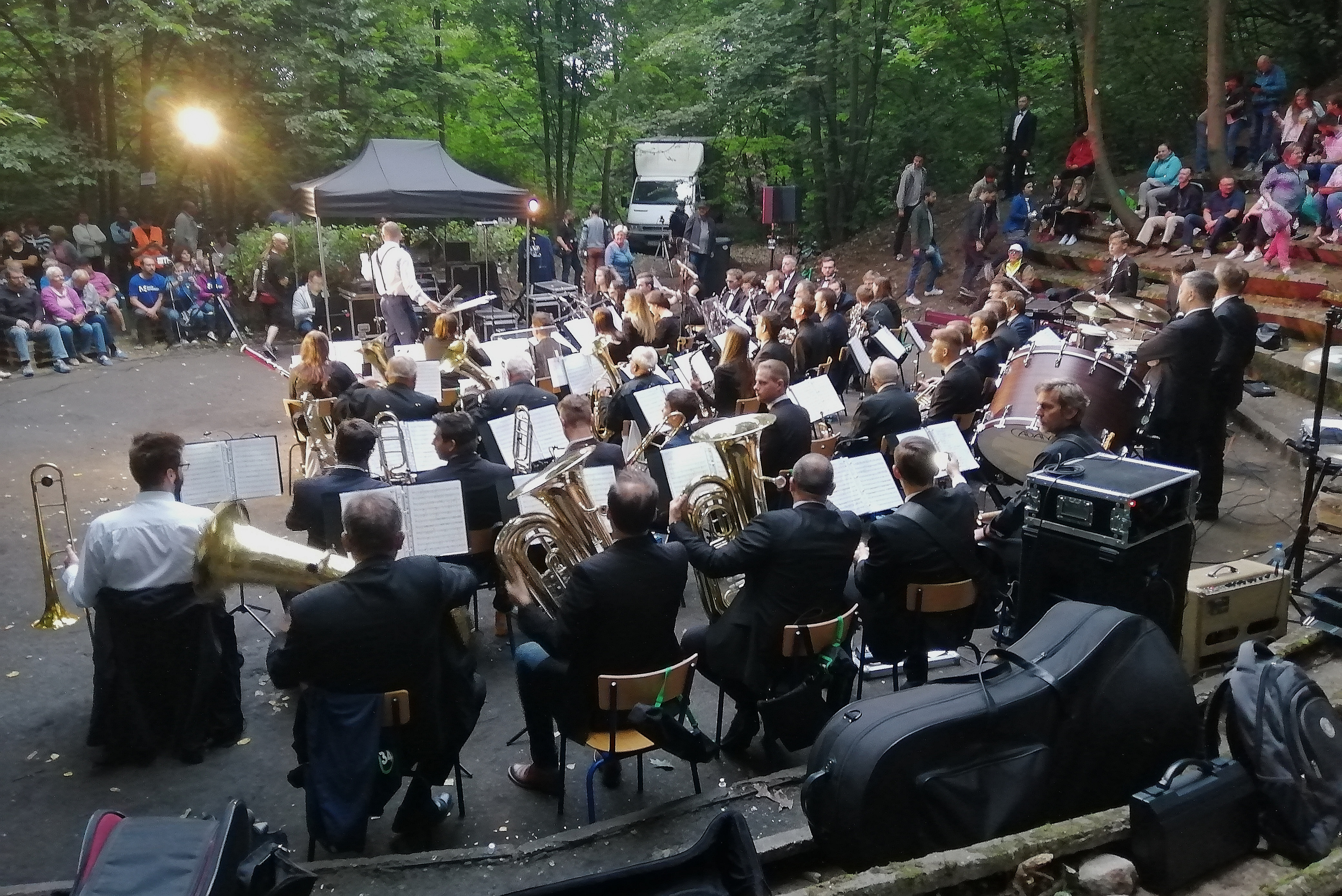 Koncert Parafialnej Kamiliańskiej Orkiestry Dętej w Tarnowskich Górach w ramach I Tarnogórskiej Nocy Muzycznej w Parku Piny